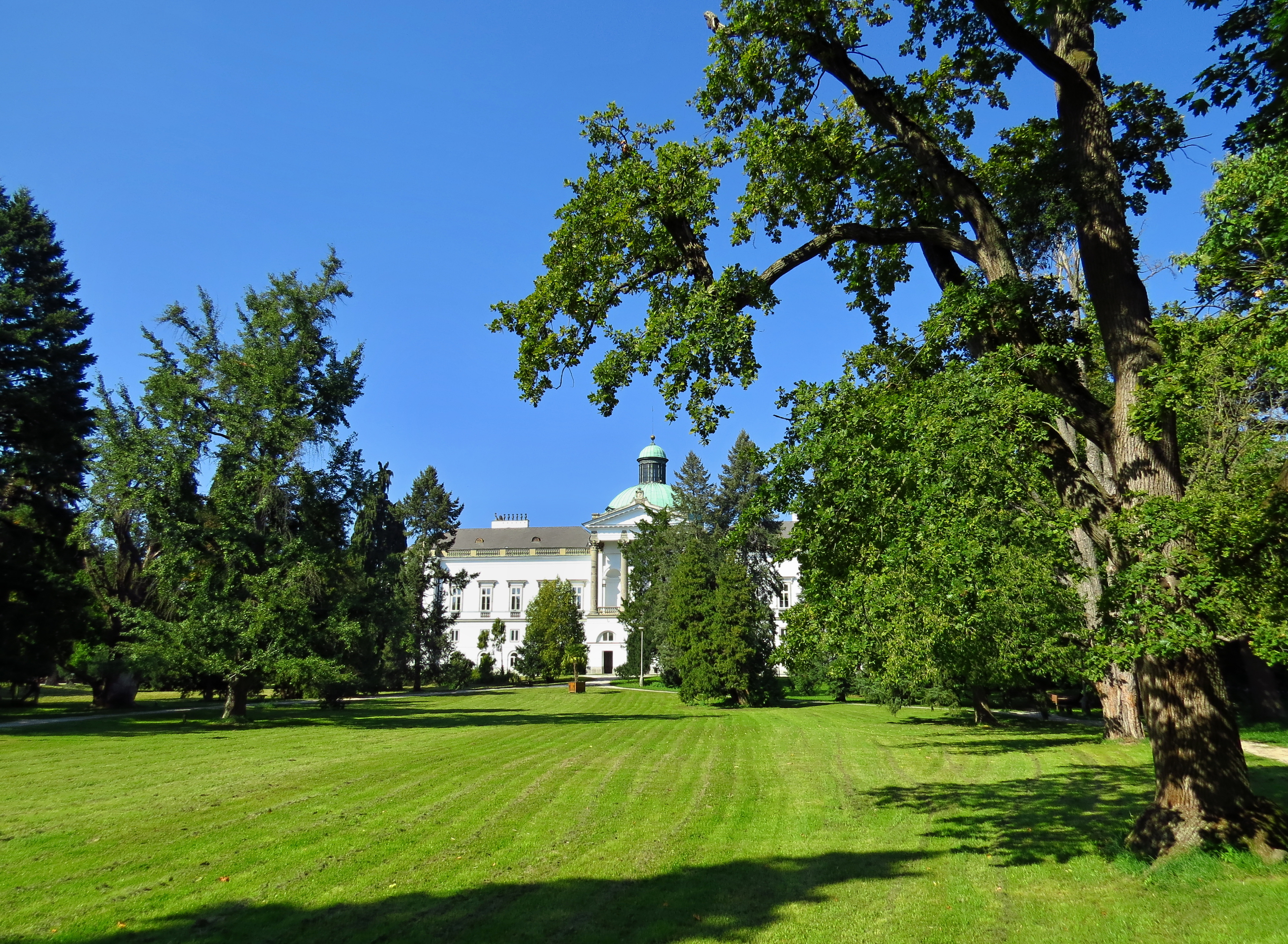 Topoľčiansky park v Topoľčiankach